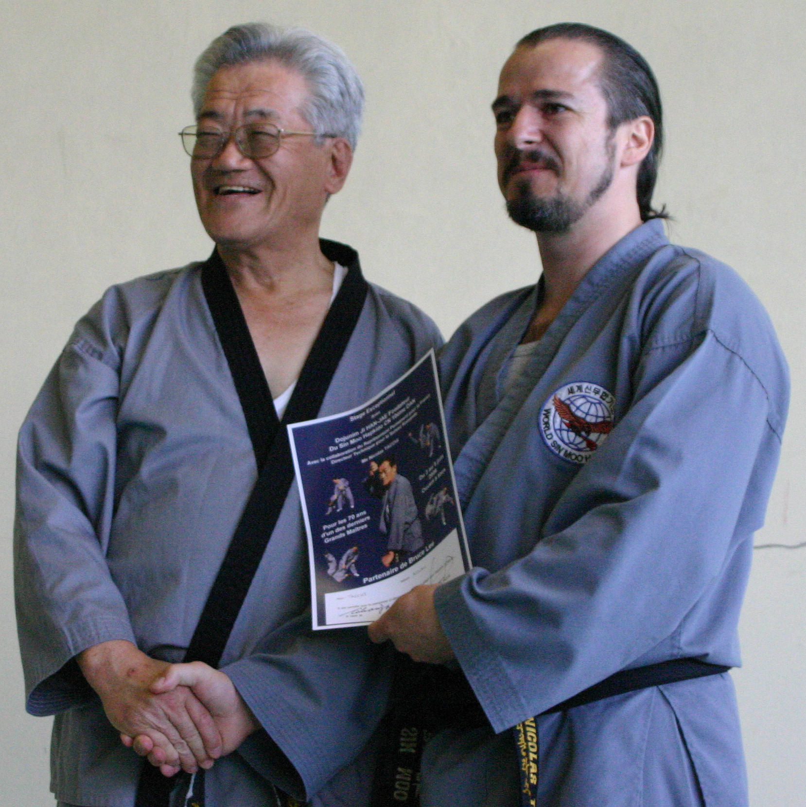 Ji Han Jae et GM Nicolas Tacchi au premier stage de Sin Moo Hapkido à Vandoeuvre-Lès-Nancy en France, en 2006